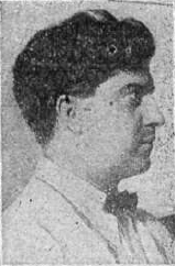 Fotografía del escultor español José Ortells López publicada en 1913 con motivo de la concesión del segundo premio en el concurso organizado por el Círculo de Bellas Artes